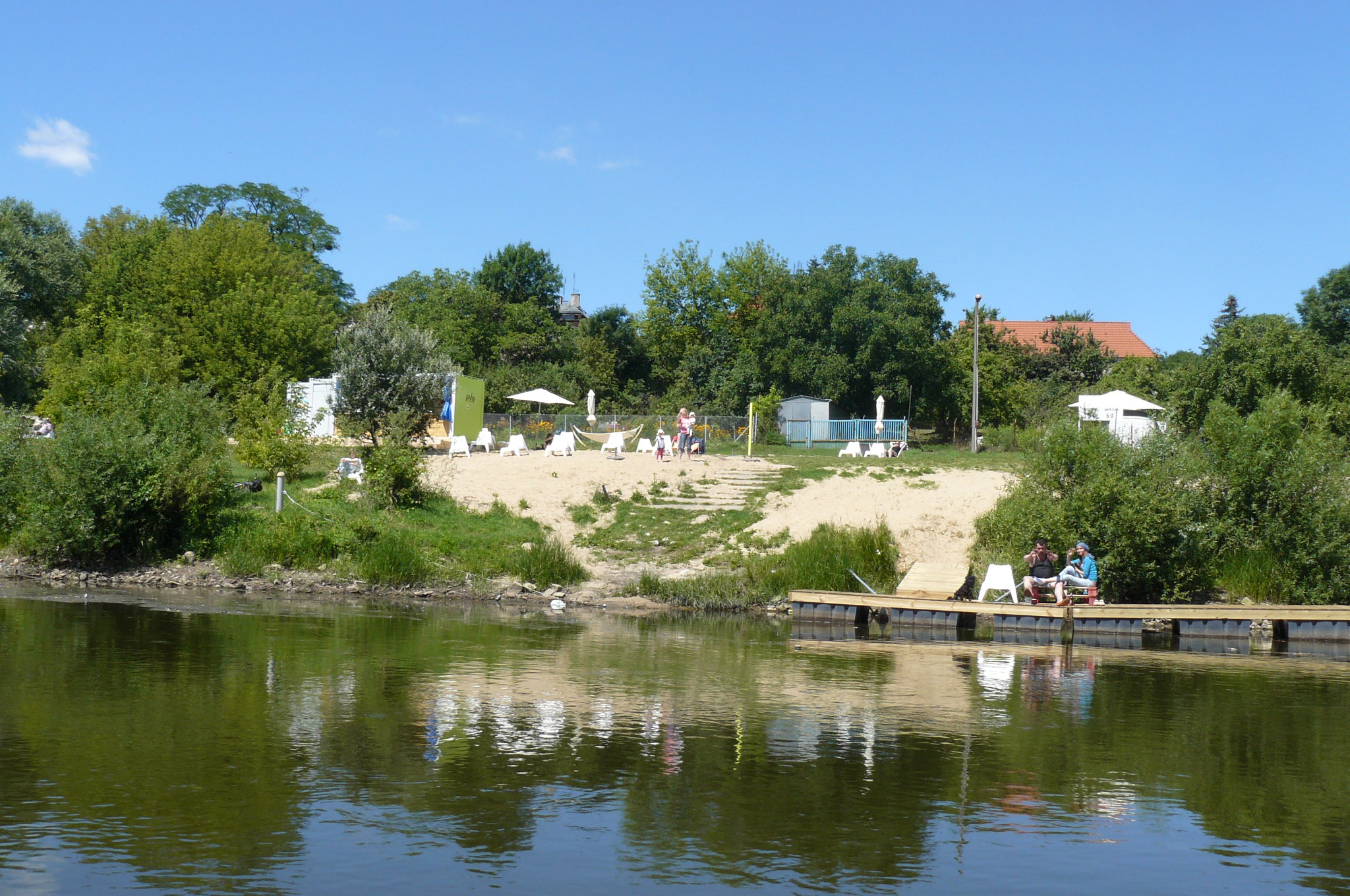 Plaża miejska na Szelągu w Poznaniu.